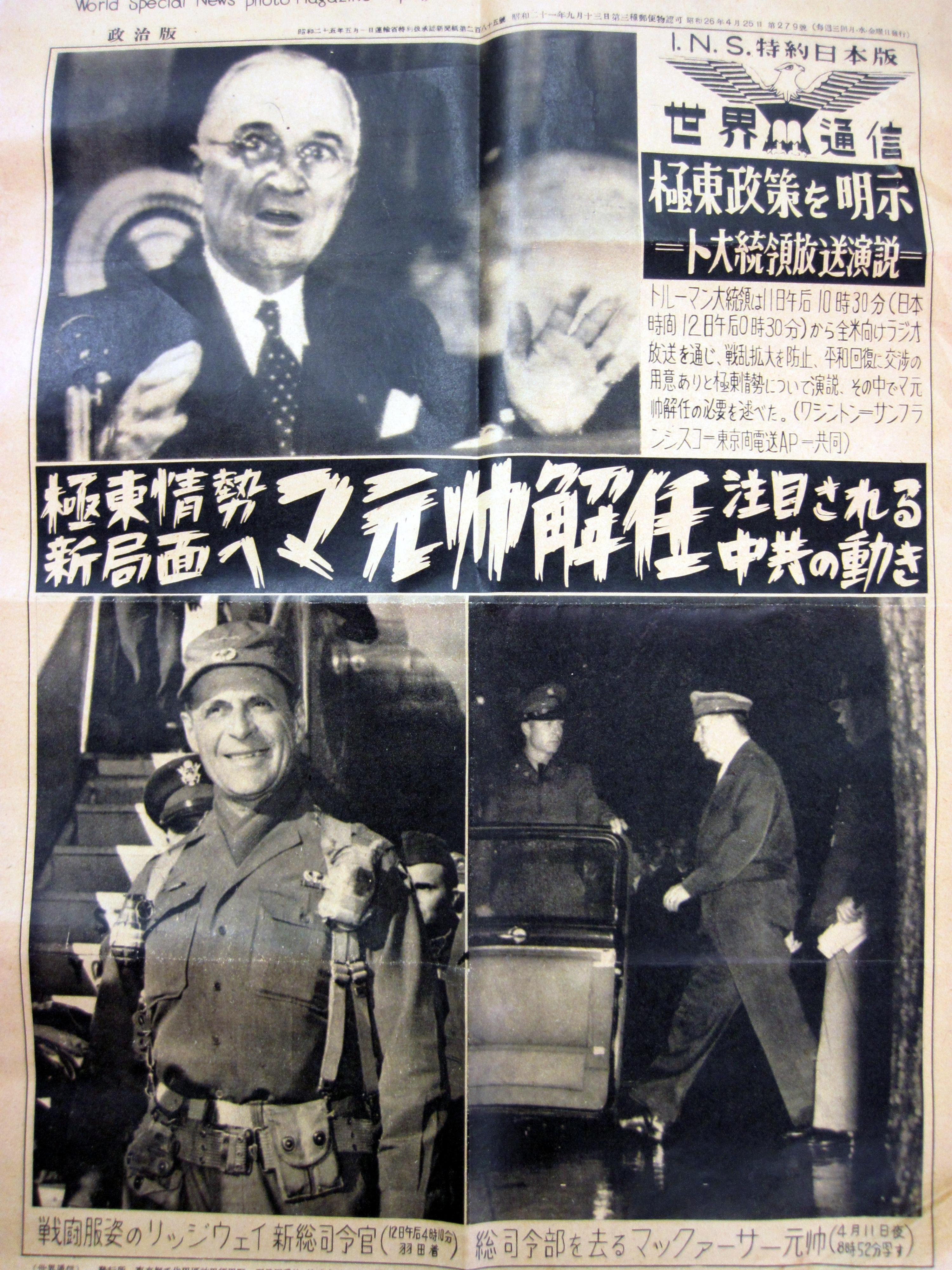 マッカーサー解任